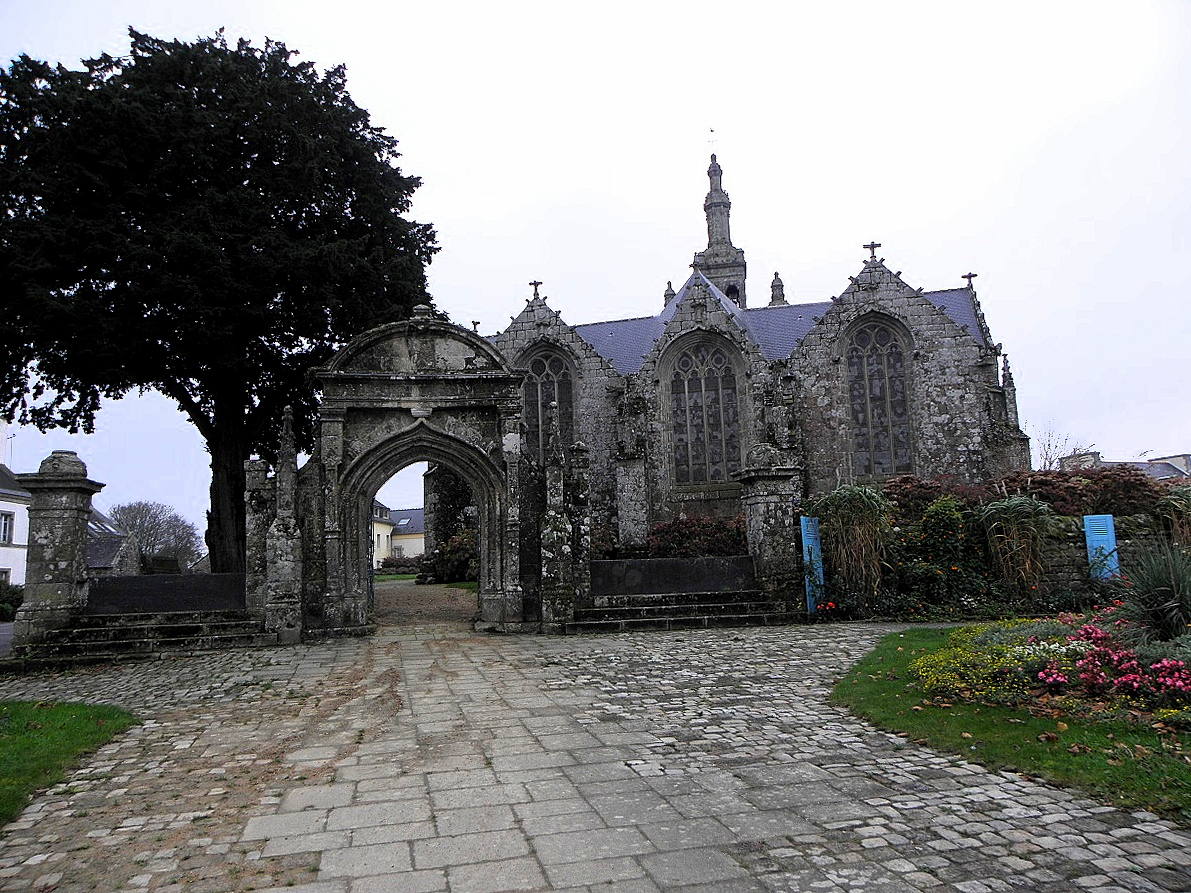 Église Saint-Thurien de Plogonnec (29).